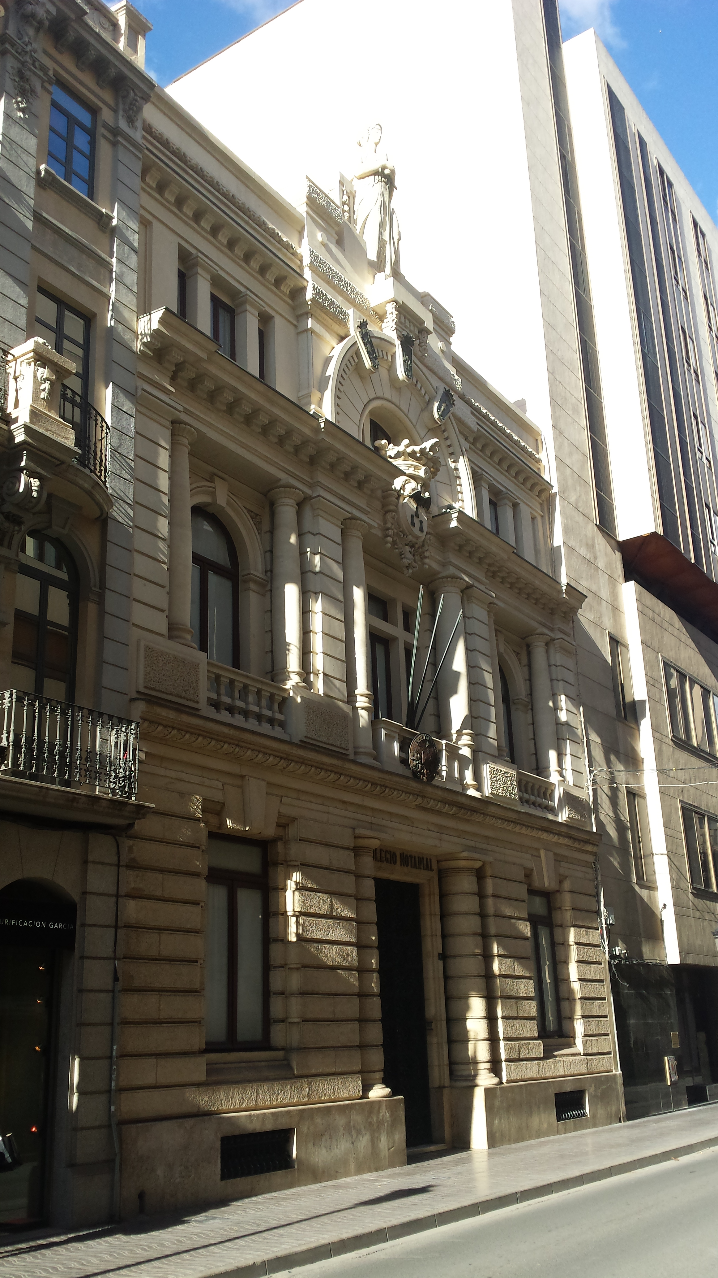 Colegio Notarial